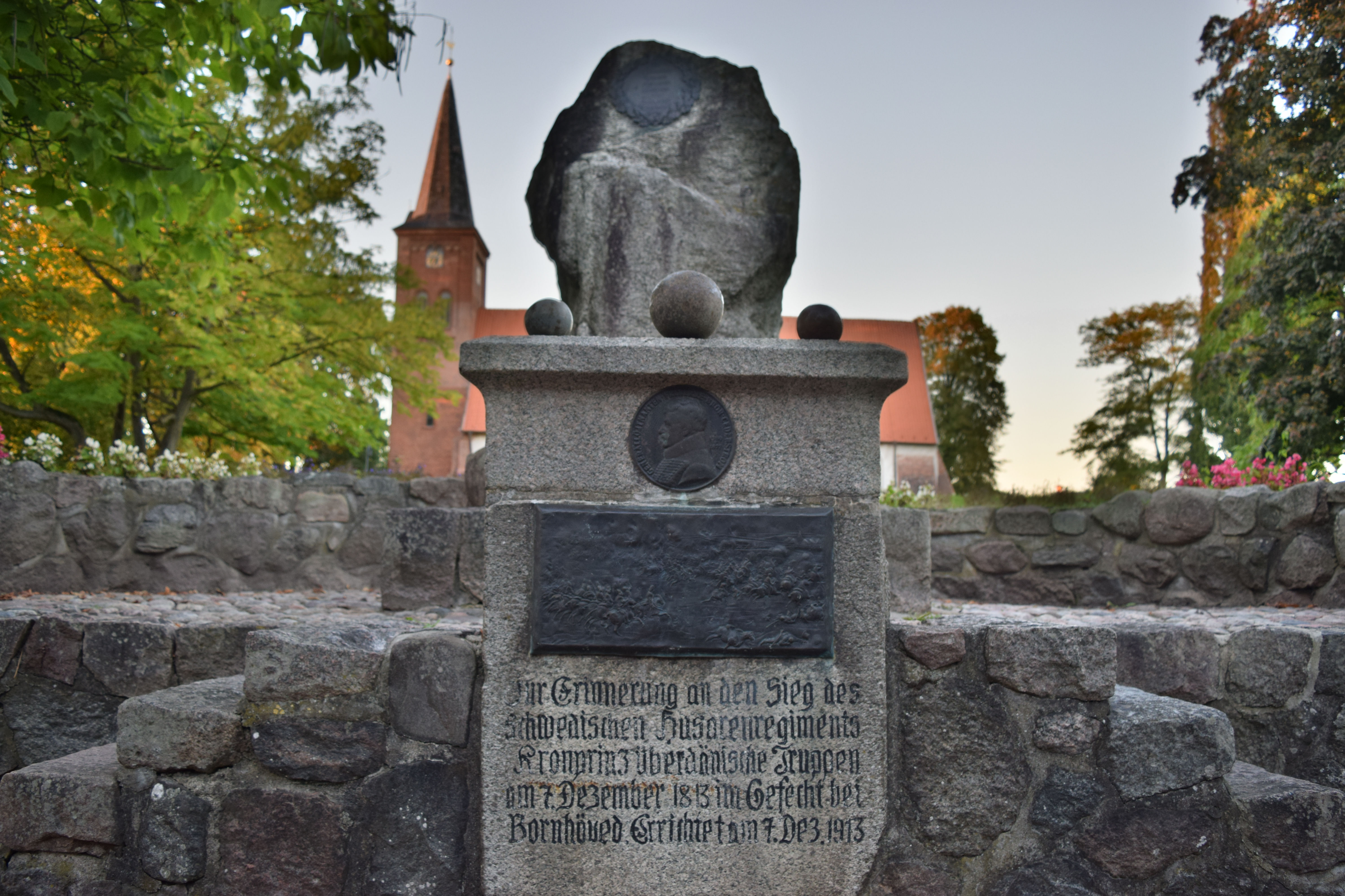 Gedenkstein zur Erinnerung an den Sieg des Schwedischen Husarenregiments Kronprinz über dänische Truppen im Gefecht bei Bornhöved am 7. Dezember 1813, errichtet am 7. Dezember 1913.